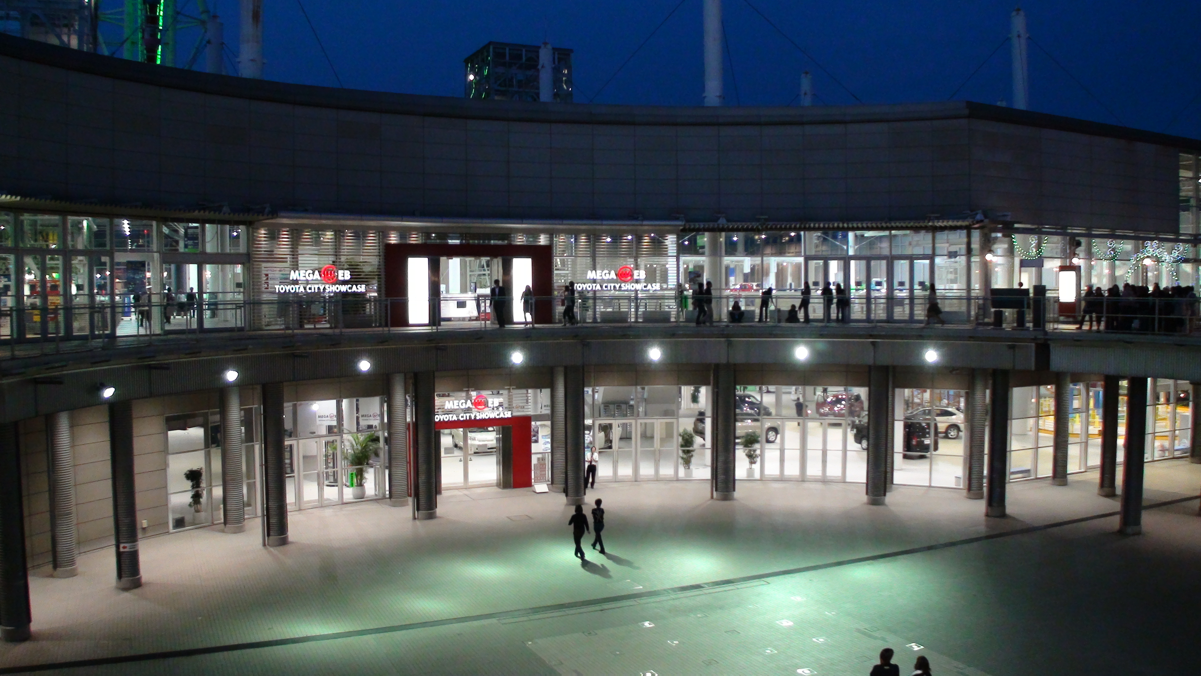 メガウェブ（東京都江東区・夜景）